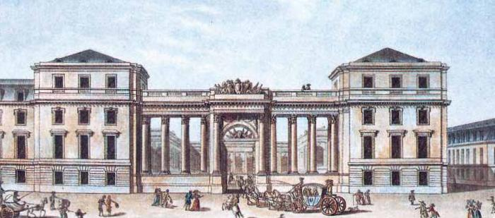 La colonnade-rideau conçue par Le Carpentier. Palais Bourbon à l'époque du Prince Condé